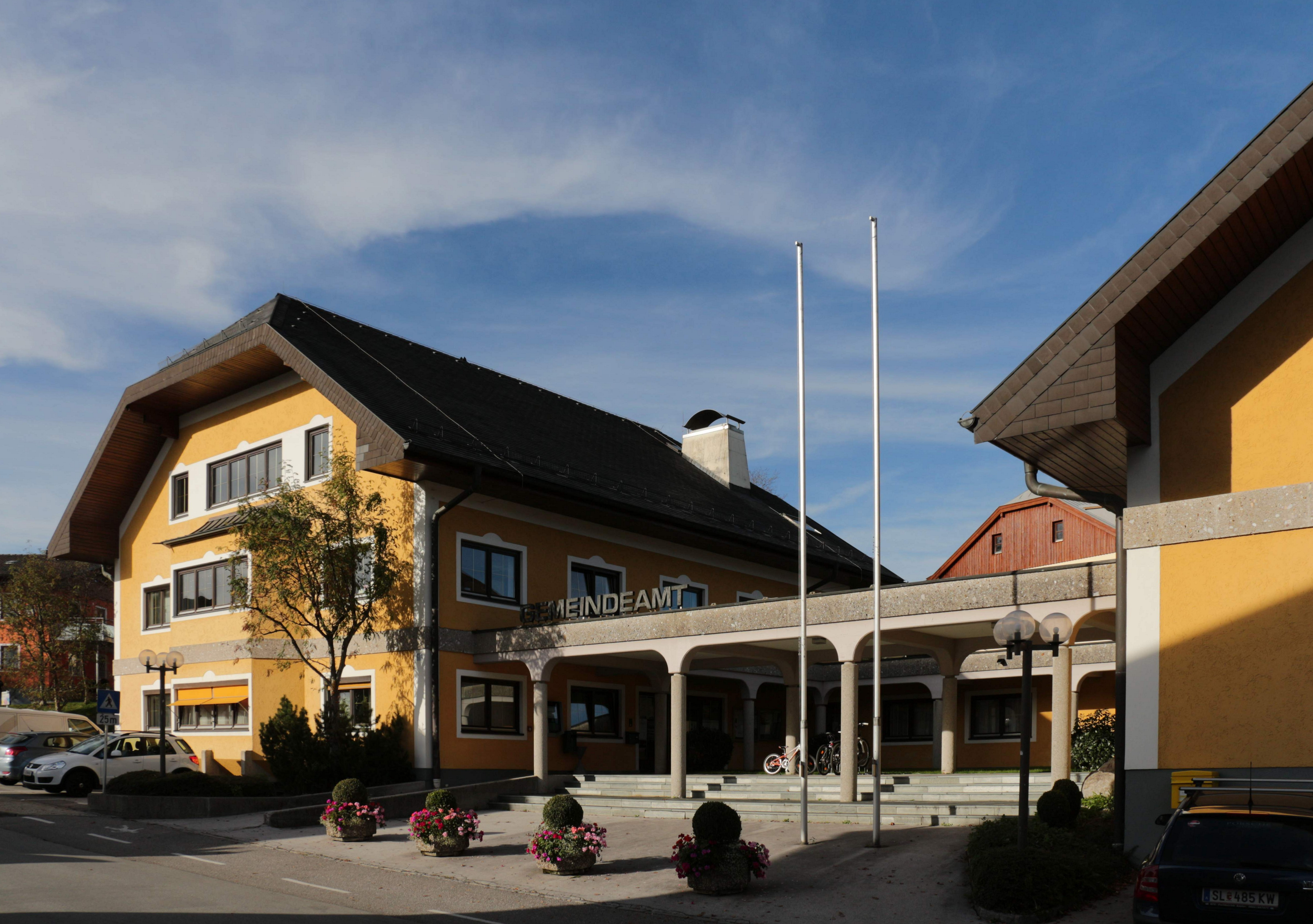 Das Gemeindeamt Hallwang, Bezirk Salzburg-Umgebung